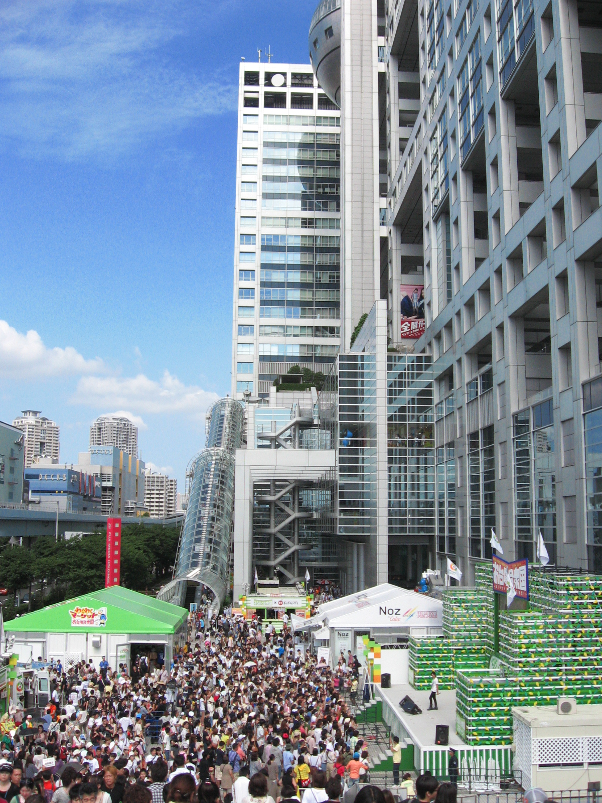 フジテレビの夏イベント「お台場合衆国」。フジテレビ本社屋エリア。（2011年8月）